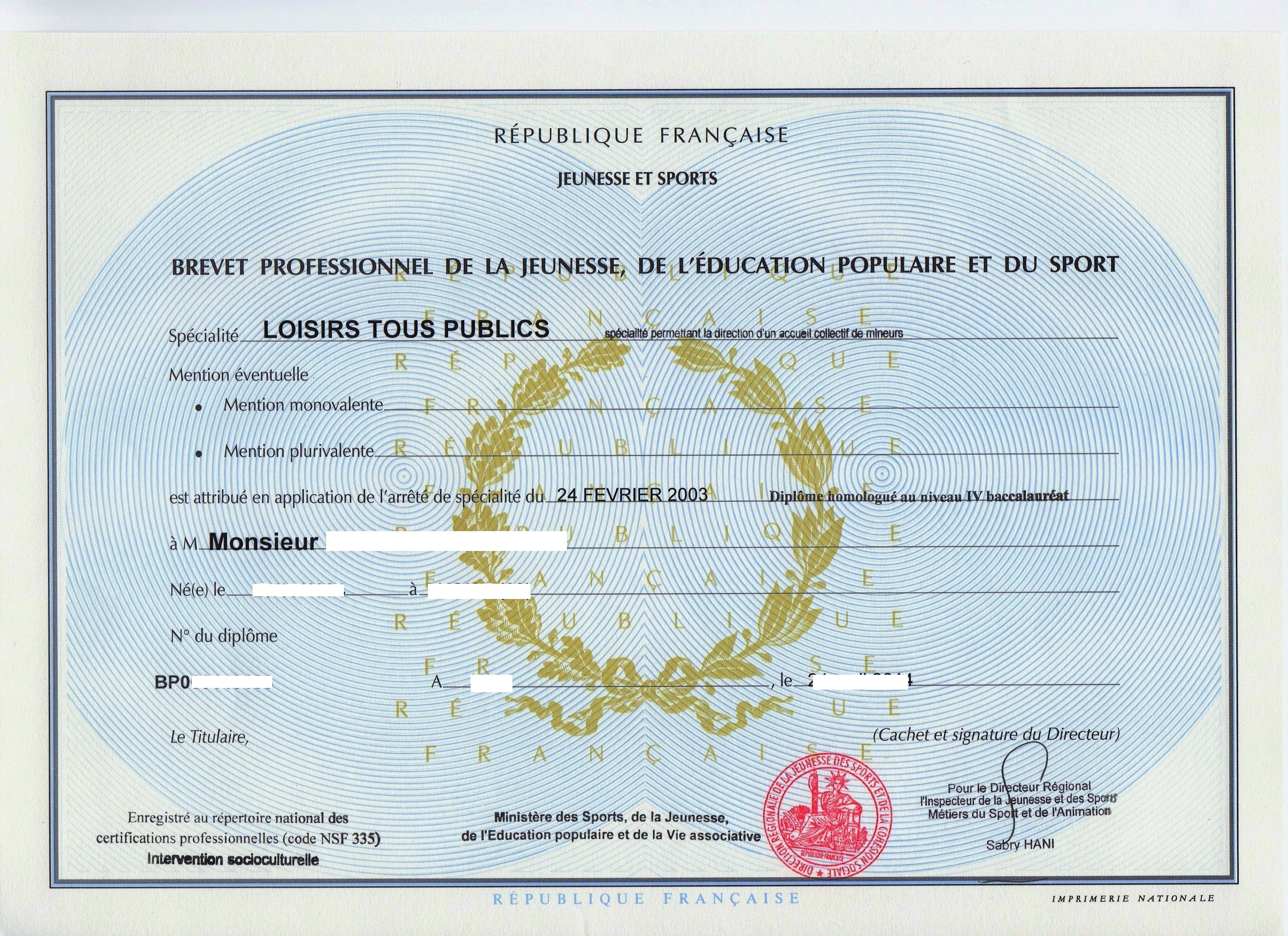 BPJEPS